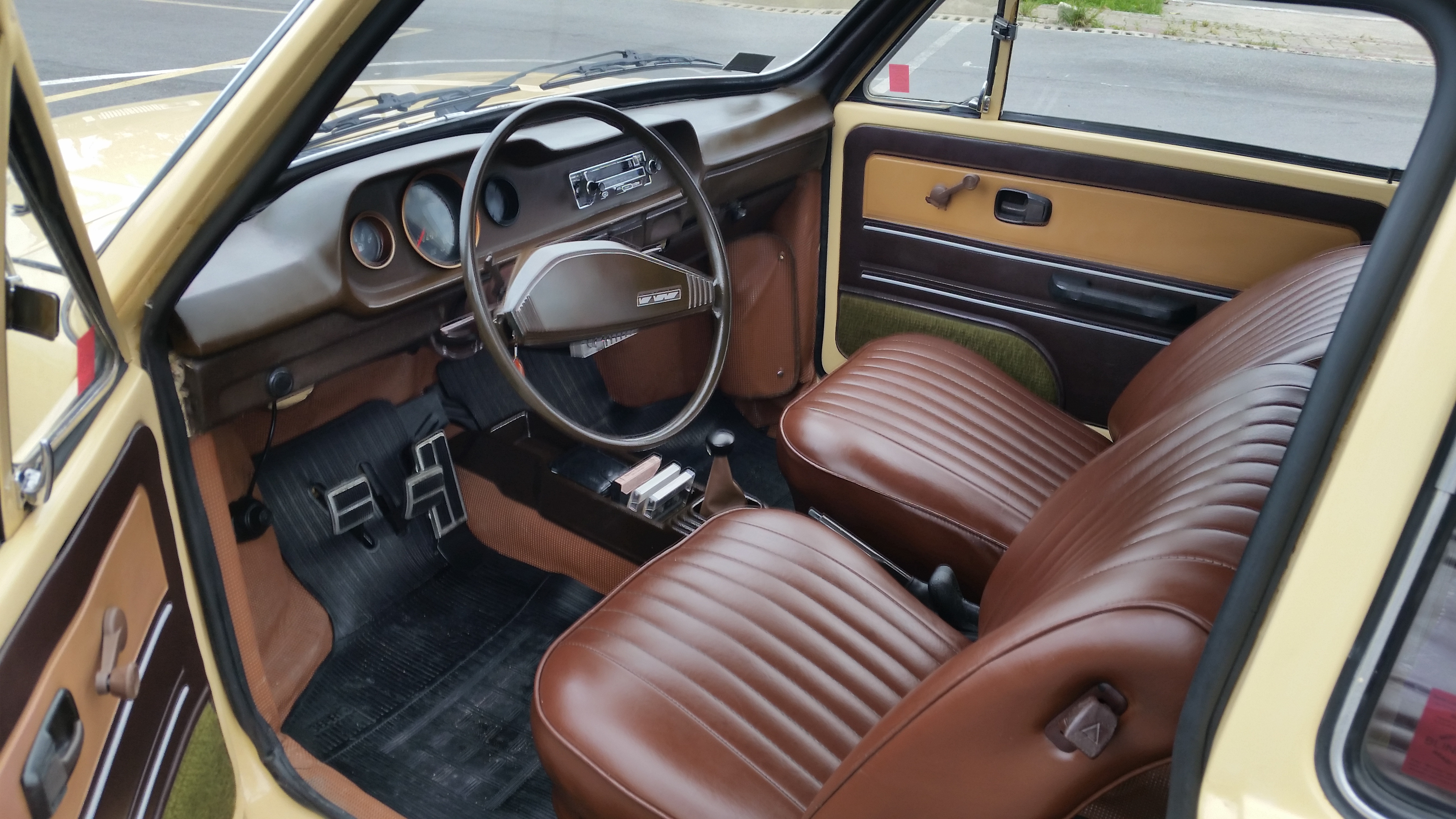 Interior Original Vw Brasilia 1979 monocromatica